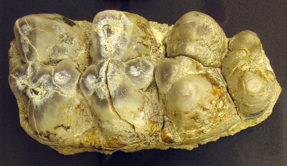 Molar de Gomphotherium sp. (vista oclusal) del Yacimiento de Somosaguas (Madrid). Aragoniense Medio (Mioceno continental)